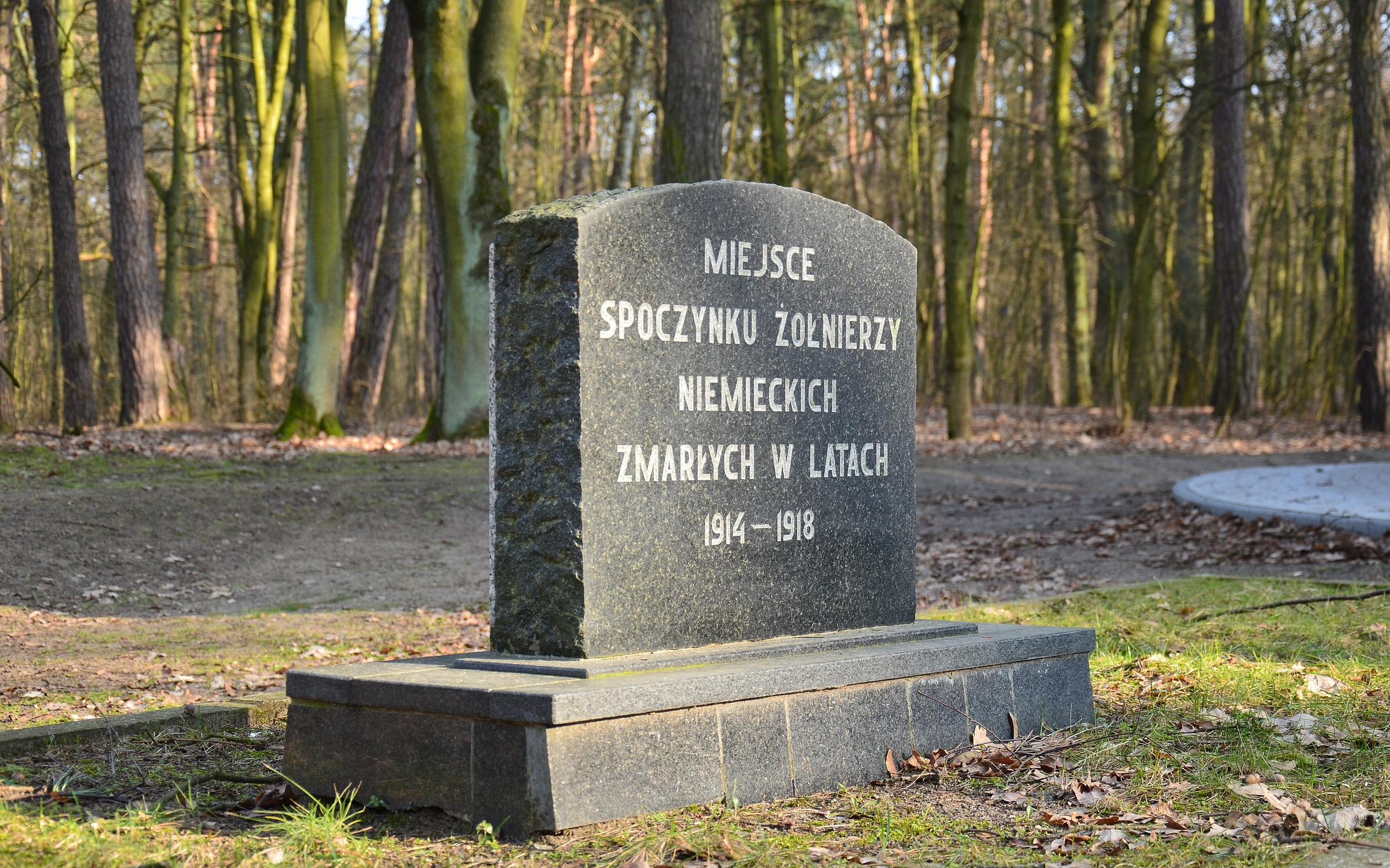 Cmentarz wojskowy w Brodnicy